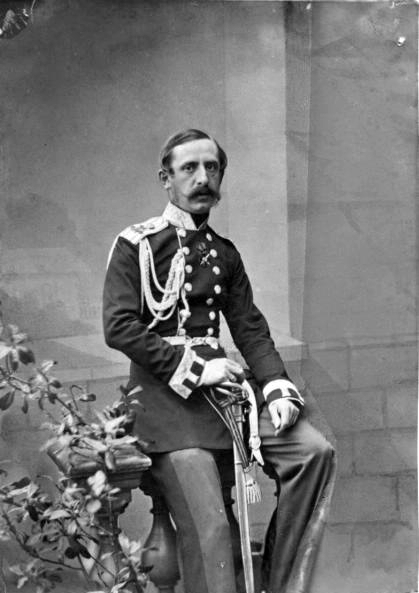 Портрет Александра Львовича Потапова в военной форме со шпагой